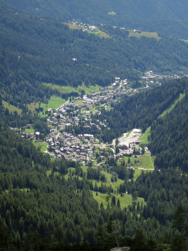 Zoldo Alto, vu depuis le nord-ouest